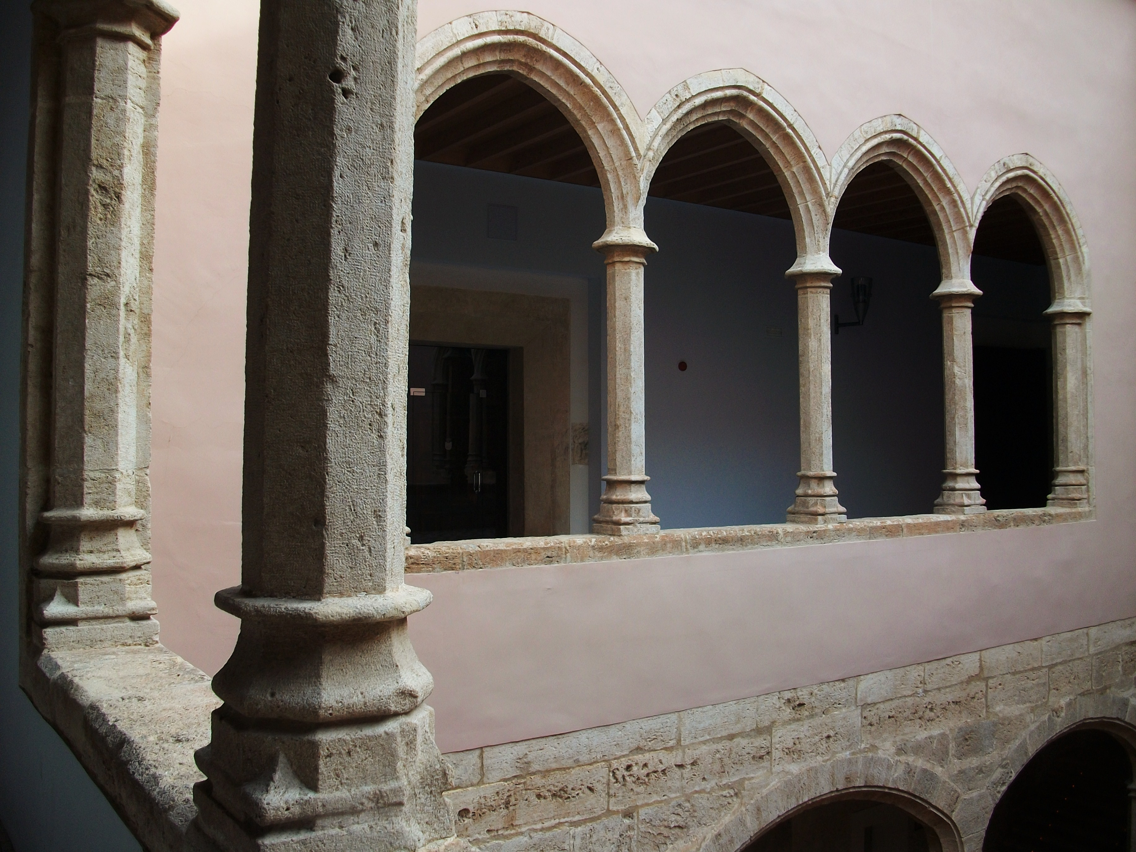 Arcs de la galeria superior del pati del castell d'Alaquàs.